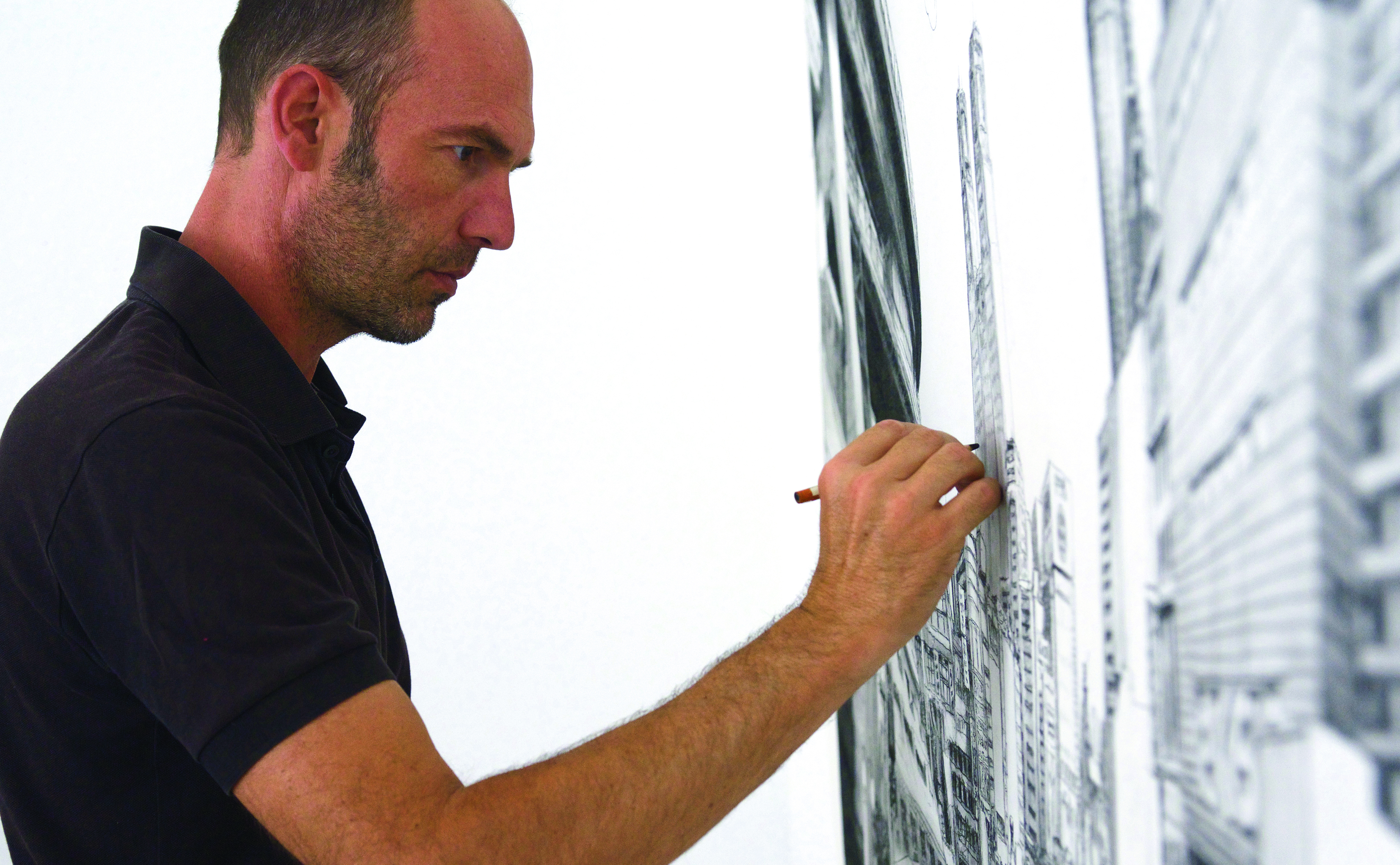 Portrait